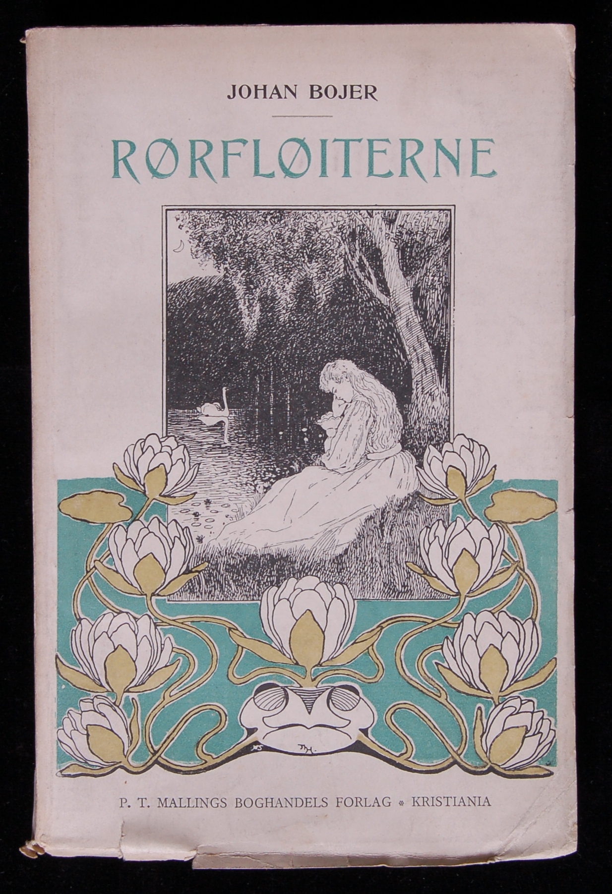 Omslag til Johan Bojers bok "Rørfløjterne" fra 1898. Ifølge museets notater på Digitalt Museums nettside bærer boken inskripsjonen "Herr Dr. Henrik Ibsen I ærbödighed fra Johan Bojer". Påskrift (med Ibsens håndskrift): Bsv. 21.11.98